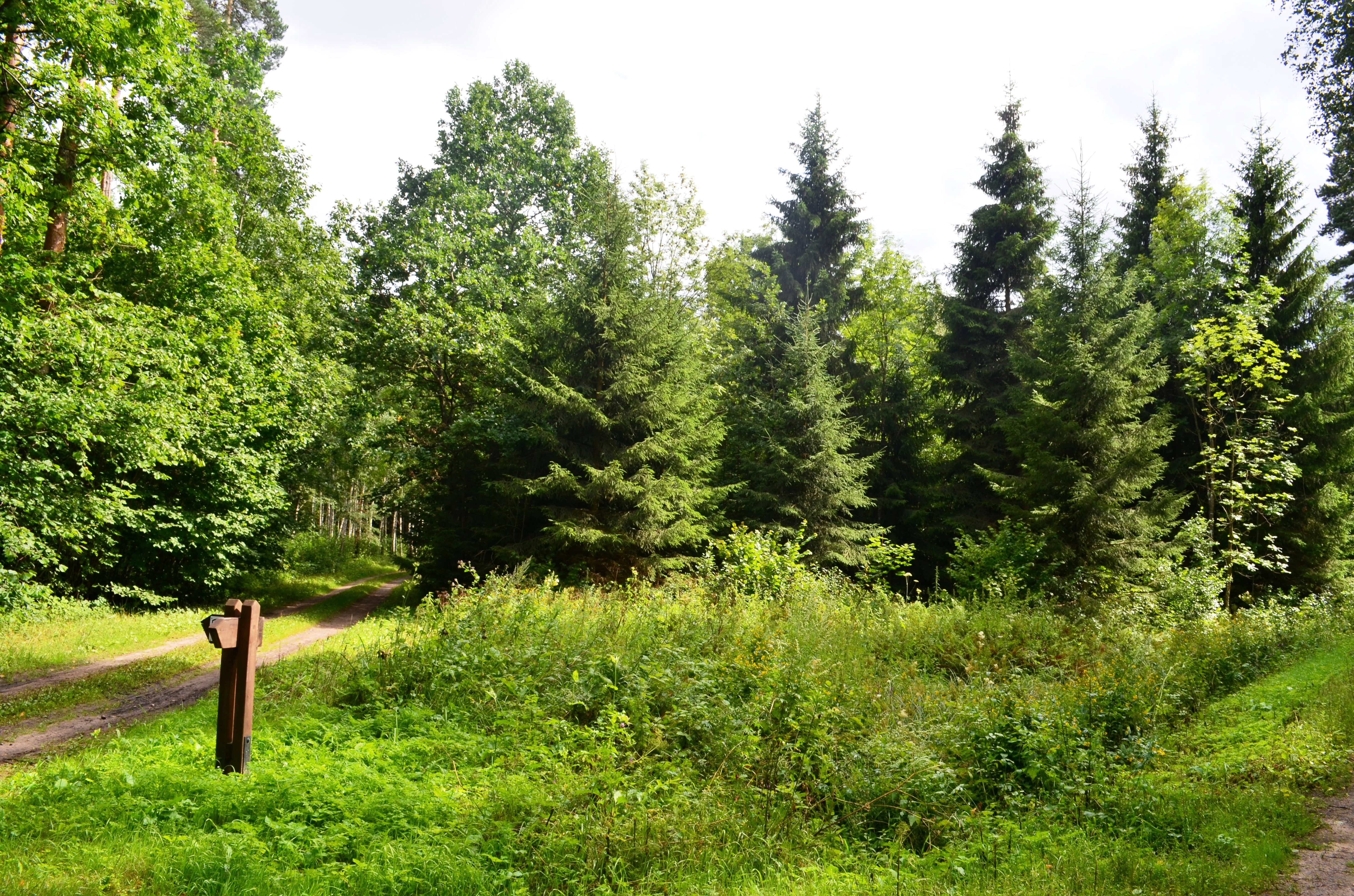 Gringalių miškas, Panevėžio raj.